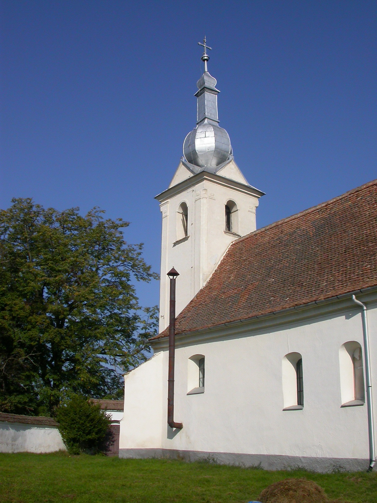 Ansamblul bisericii romano-catolice, sec. XIII - XVIII